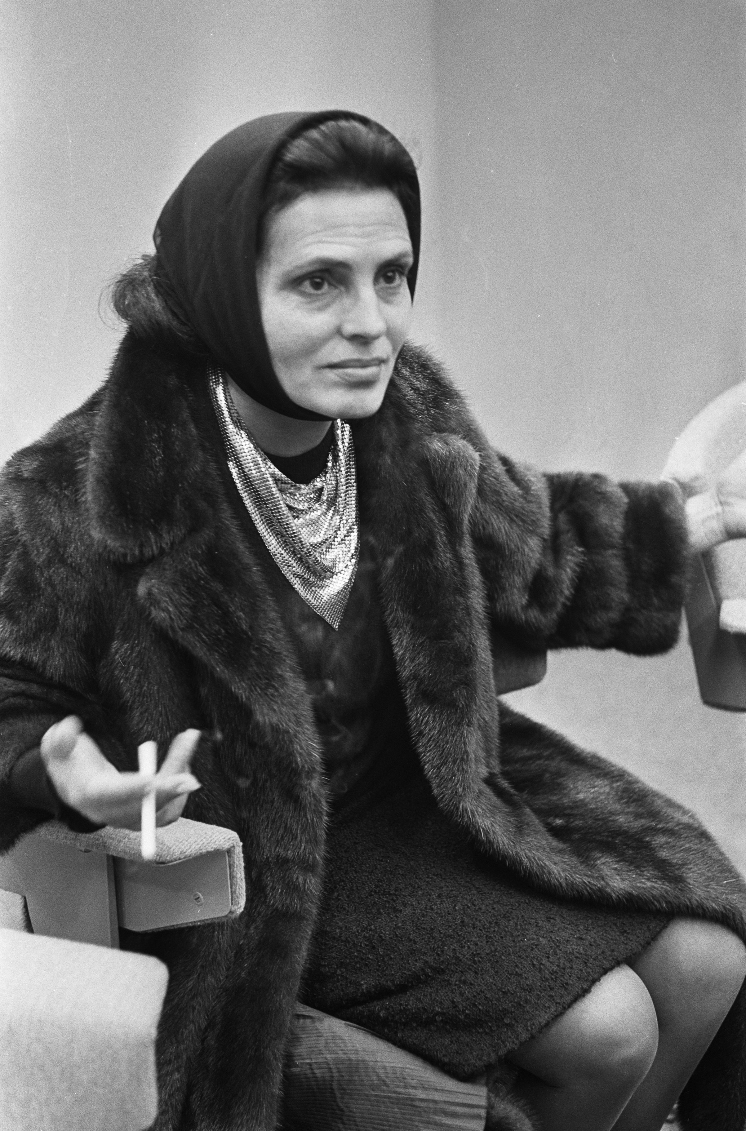 Collectie / Archief : Fotocollectie Anefo Reportage / Serie : [ onbekend ] Beschrijving : Amalia Rodrigues [Portugese fado-zangeres] op Schiphol Datum : 8 oktober 1964 Locatie : Noord-Holland, Schiphol Trefwoorden : portretten, zangeressen Persoonsnaam : Rodrigues, Amalia Fotograaf : Pot, Harry / Anefo Auteursrechthebbende : Nationaal Archief Materiaalsoort : Negatief (zwart/wit) Nummer archiefinventaris : bekijk toegang 2.24.01.05 Bestanddeelnummer : 916-9841